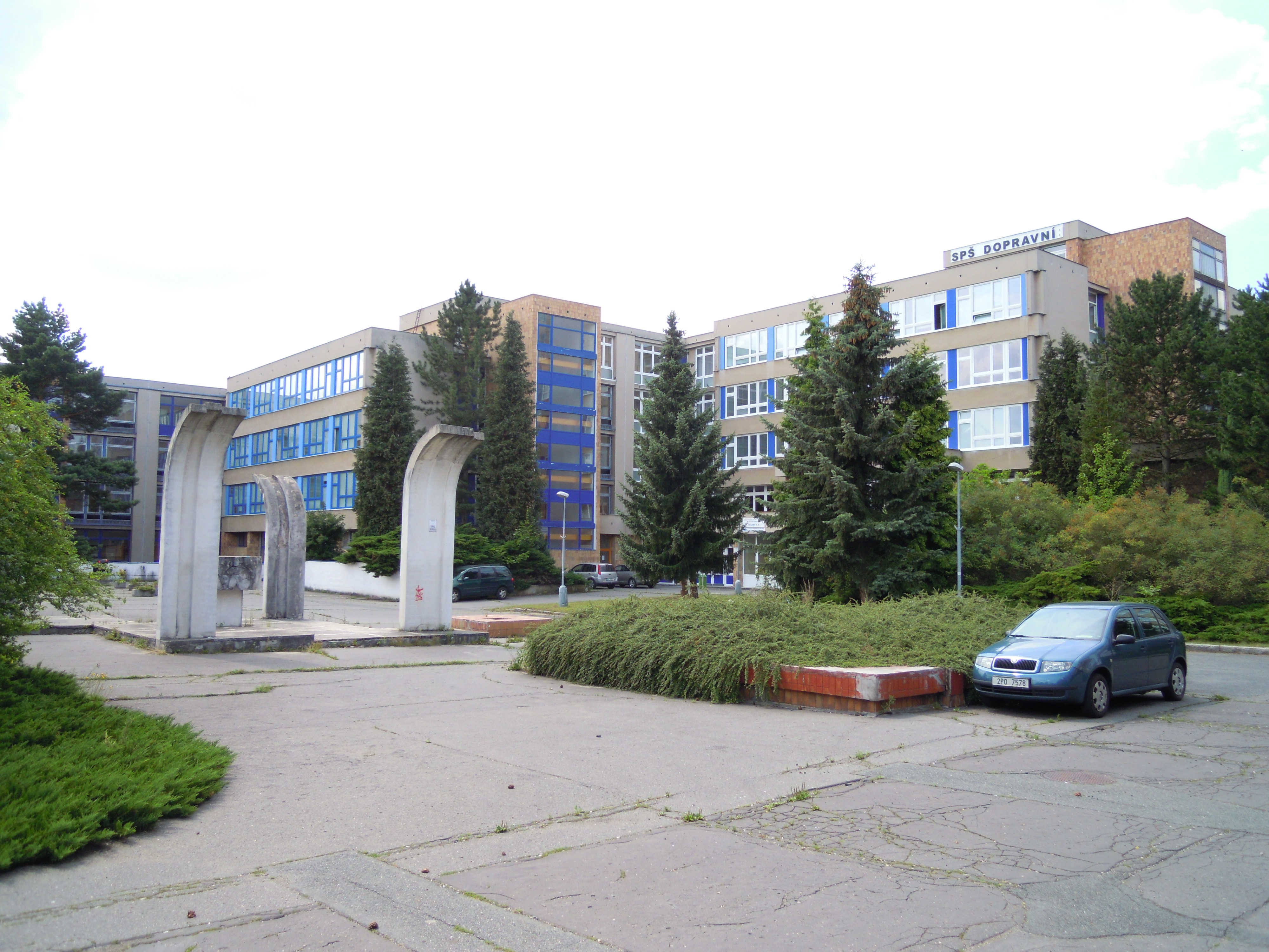 Budova Střední průmyslové školy dopravní Plzeň, Karlovarská 99